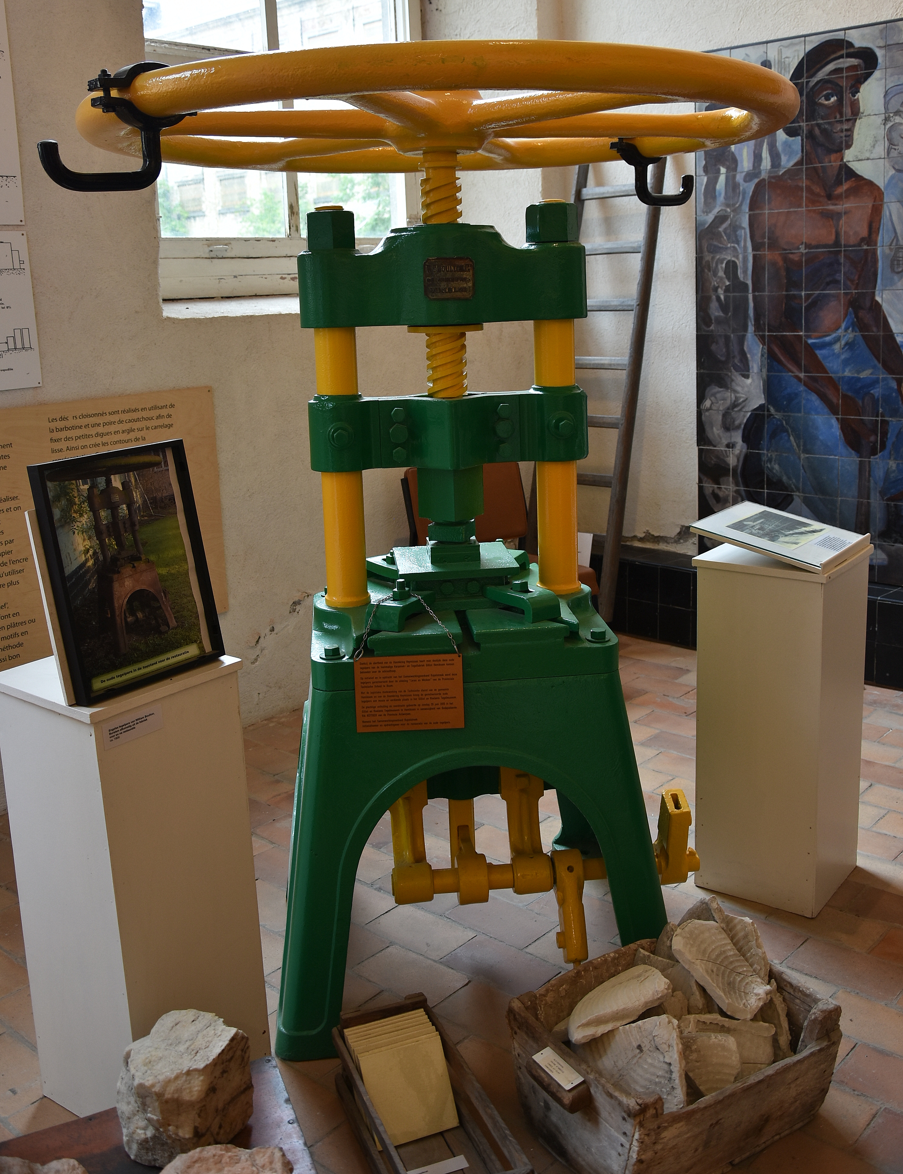 Tegelpers Gilliot & Roelants tegelmuseum Hemiksem 27-07-2019 This photo of movable heritage has been taken in the Flemish Region